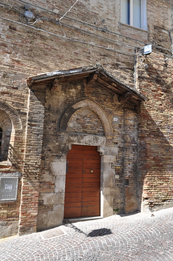 Penne (comune, Italy) 2012